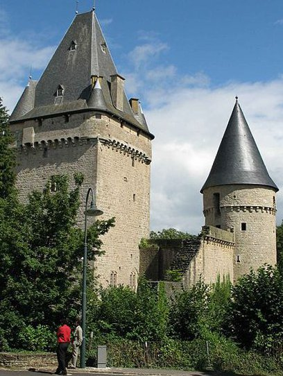 Le château de Hollenfels (Luxembourg)